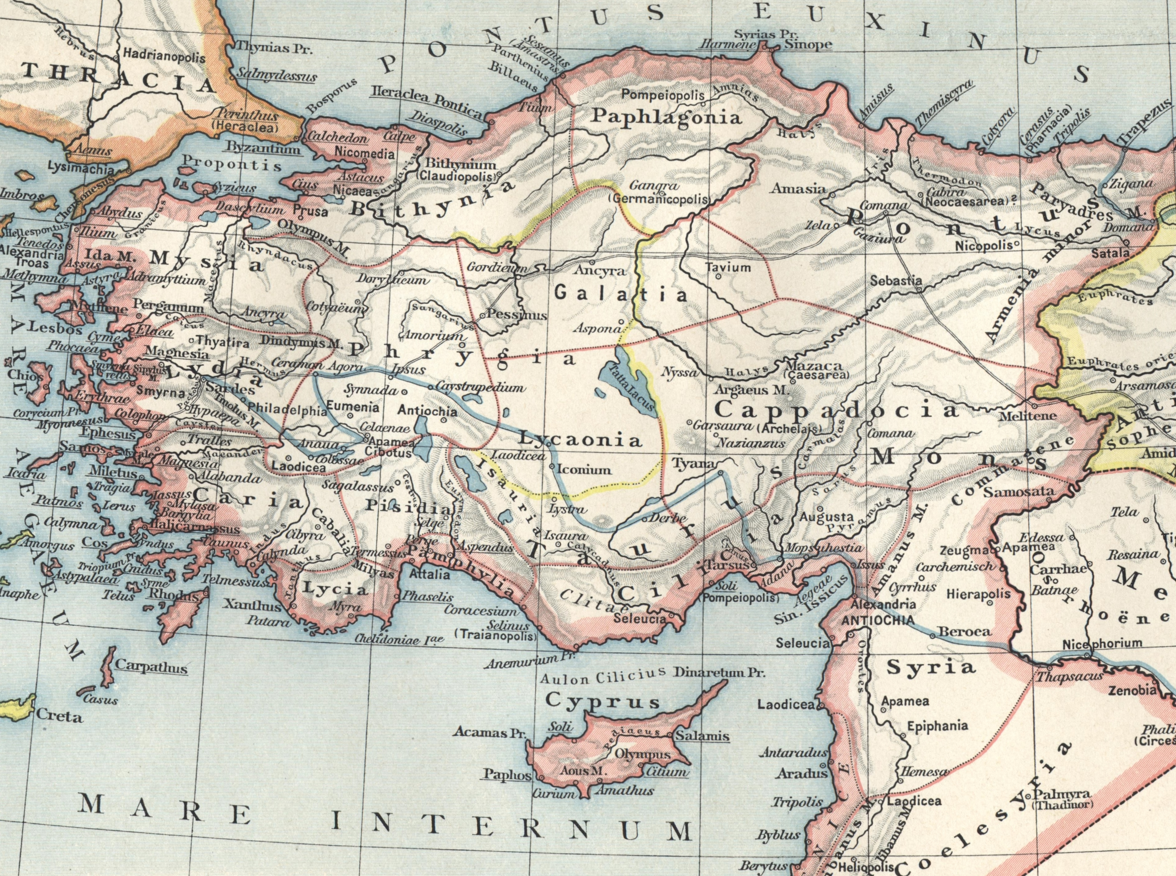 Karte von Kleinasien in der Antike mit römischen Provinzen.